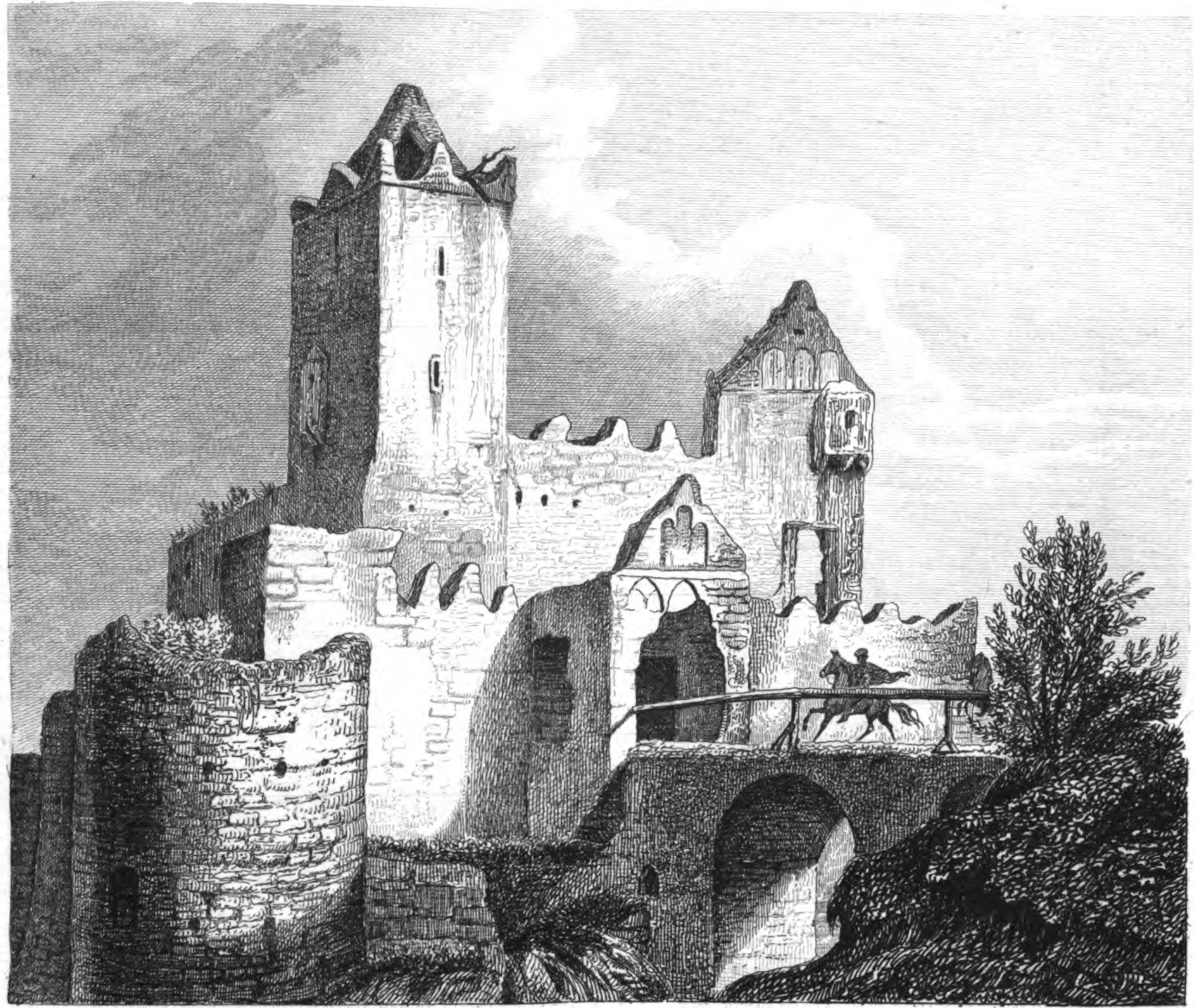 Stahlstich mit Ansicht der Rudelsburg bei Bad Kösen 1859